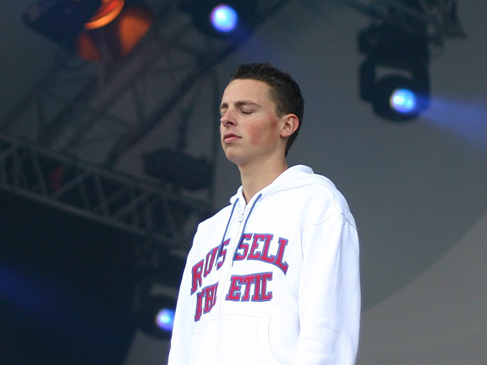 Baas B.jpg